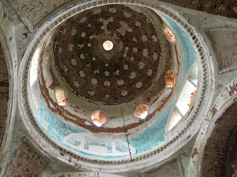 Купол